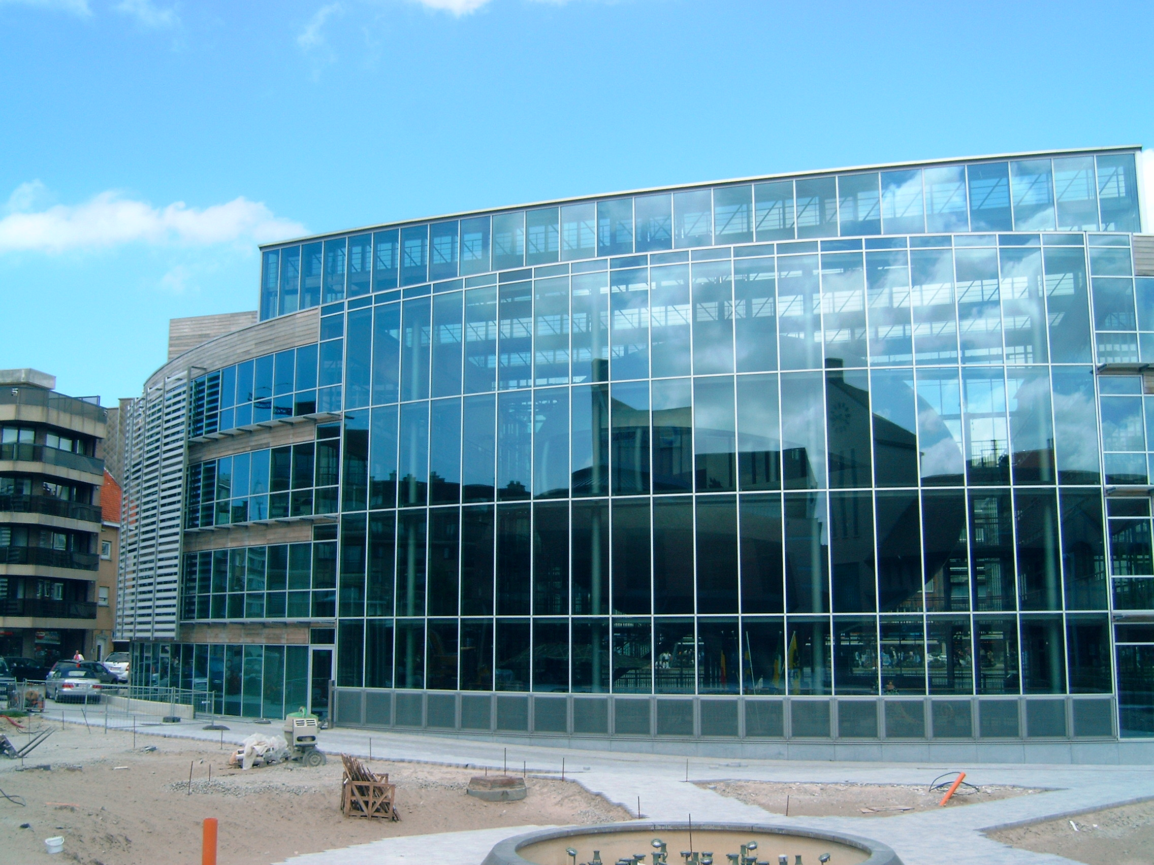 Rückseite des Gemeindehauses in Koksijde